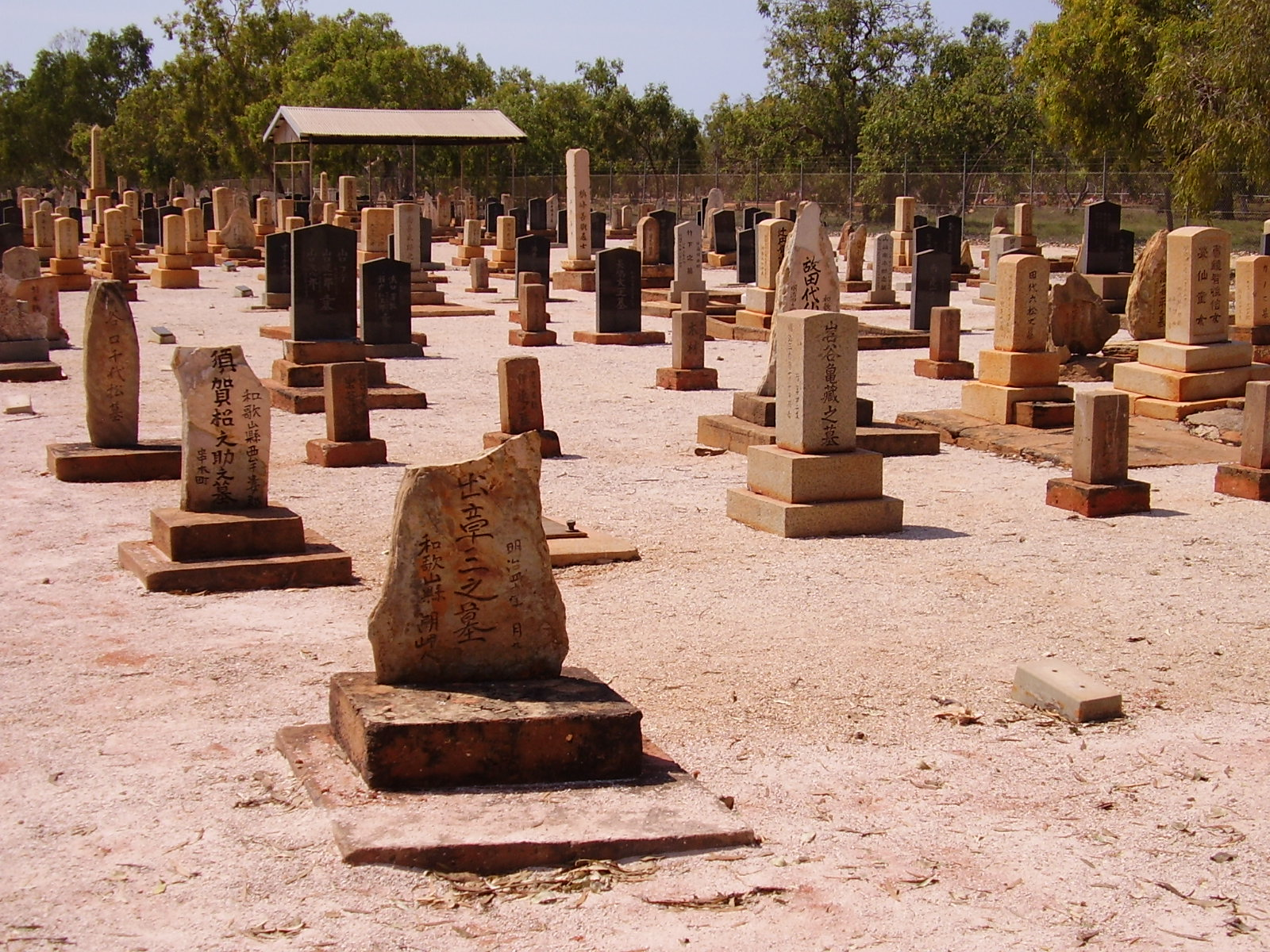 Broome wa